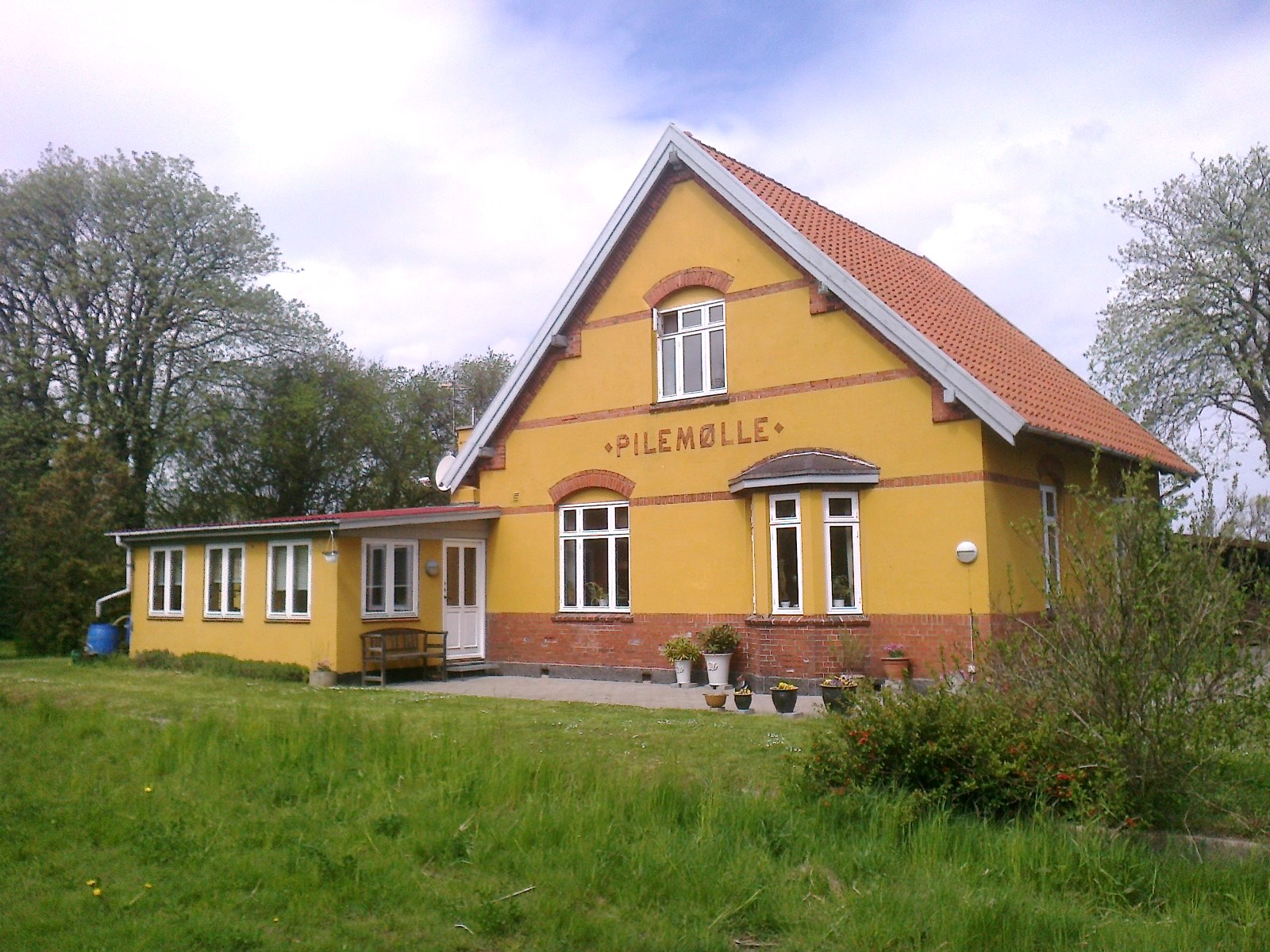 Pilemølle Formandshus, sporside